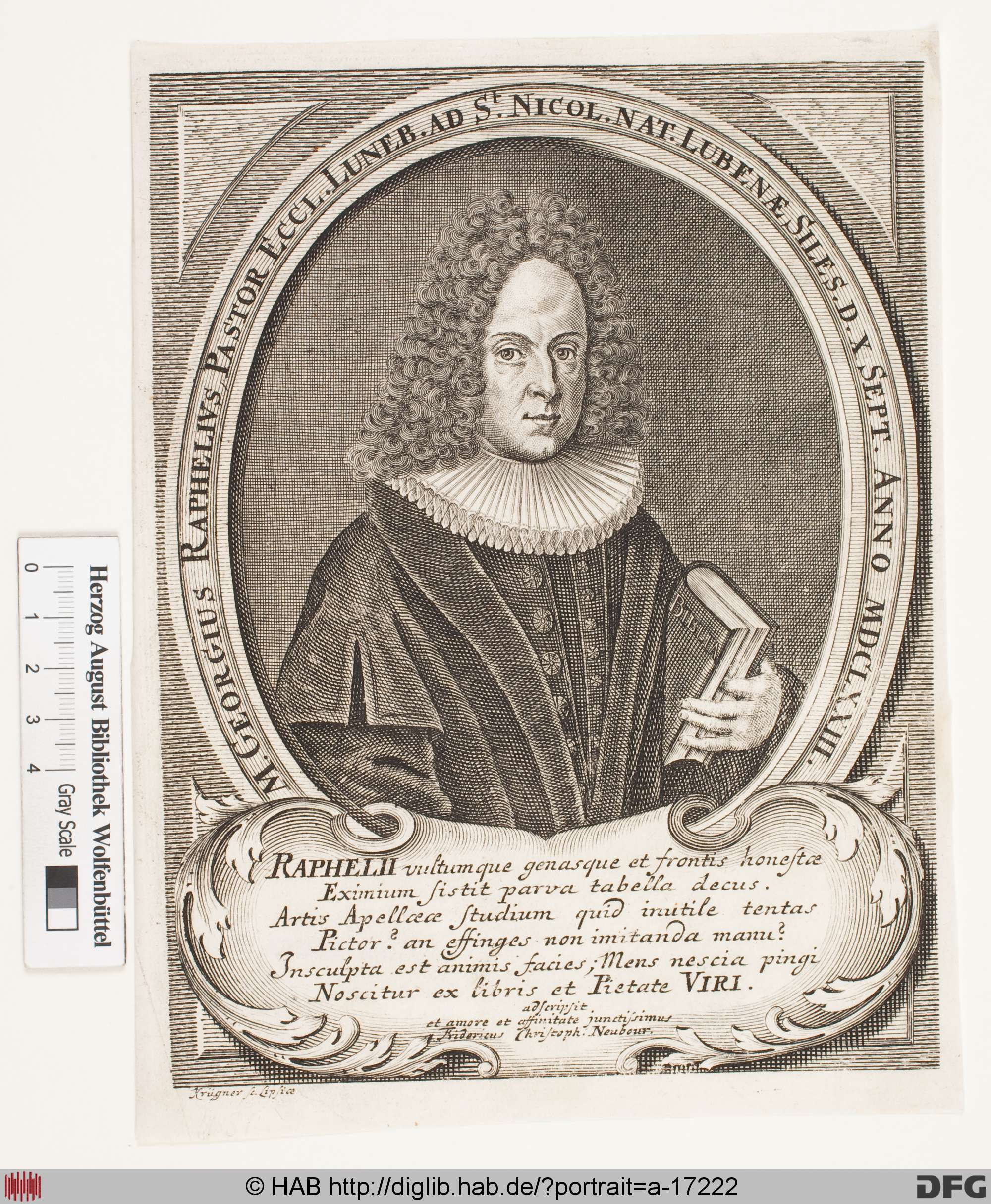 Johann Gottfried Krügner (der Ältere): Bildnis des Pastors und späteren Superintendenten Georg Raphel in Lüneburg